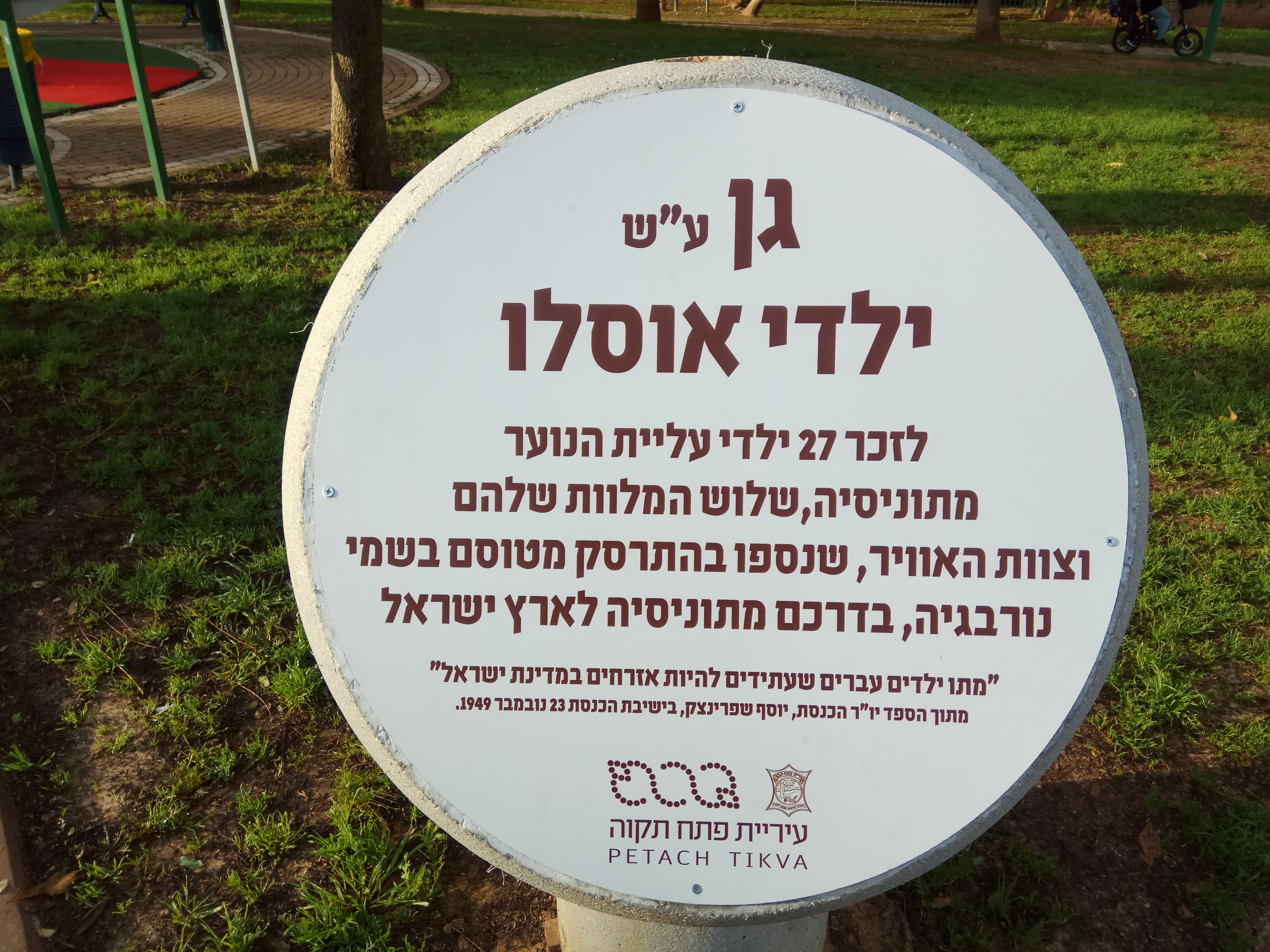 גן ילדי אוסלו ברחוב הרב פינטו בפתח תקוה